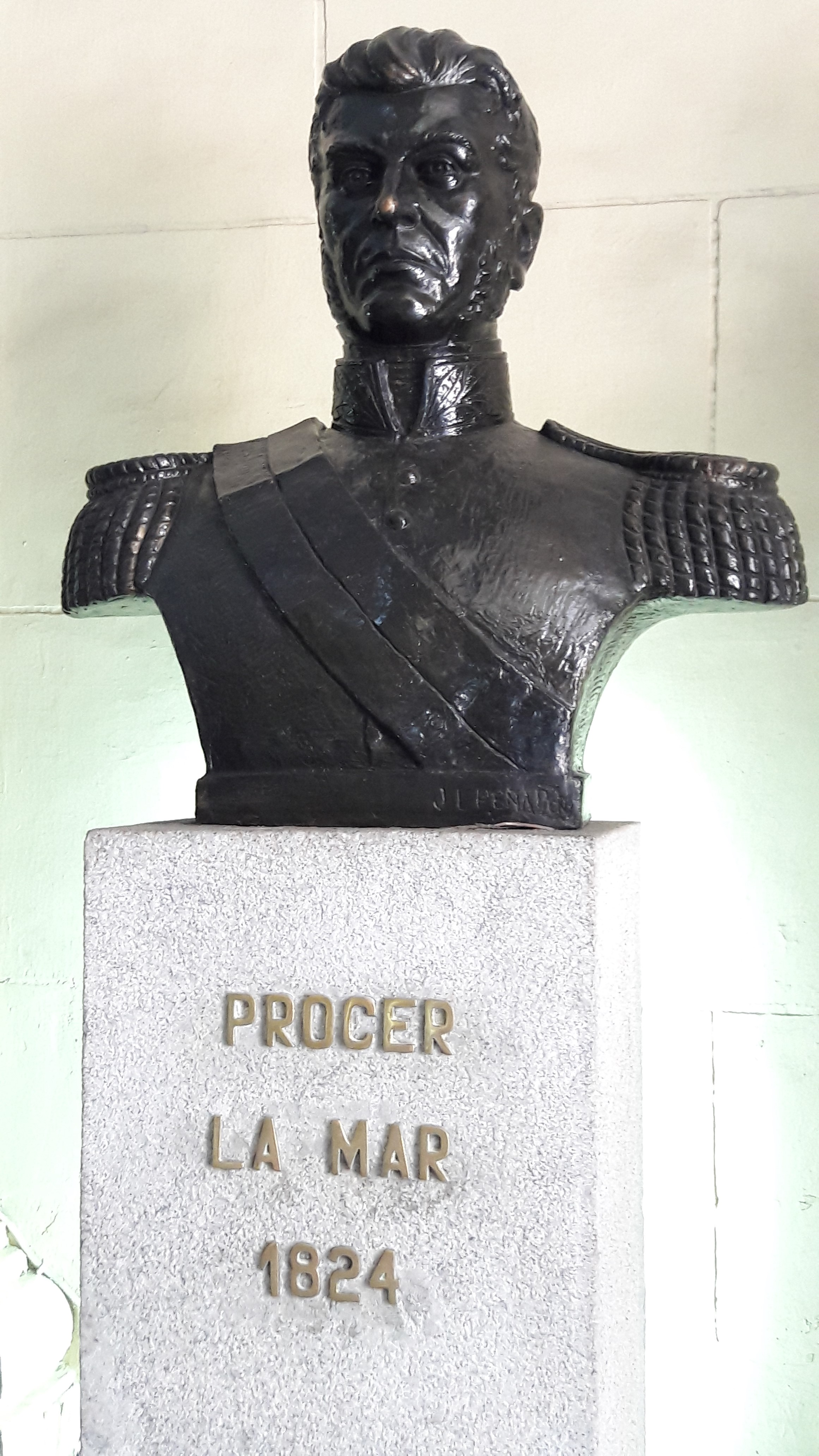 Prócer La Mar 1824